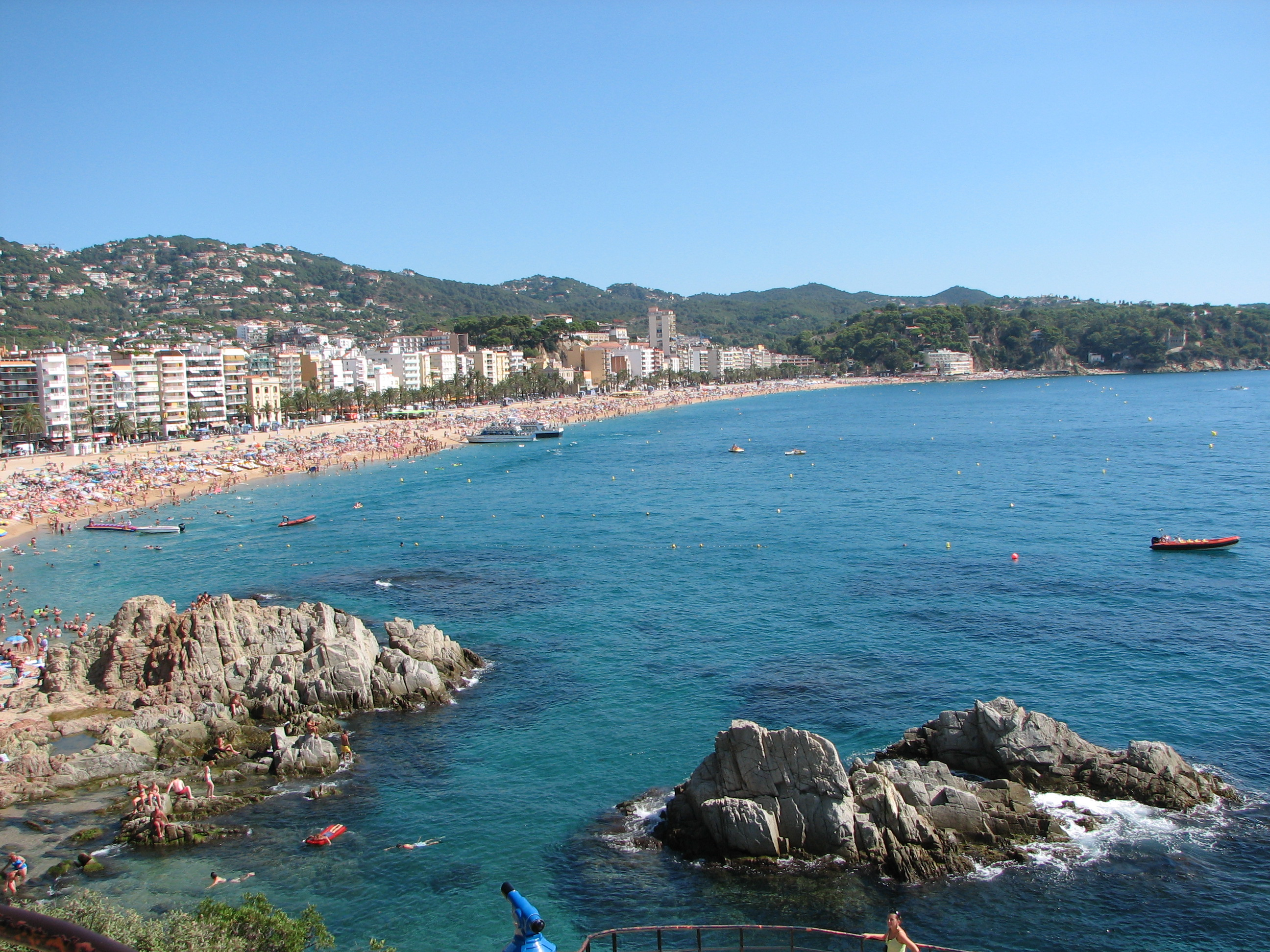 Lloret de Mar beach, Catalonia, Spain